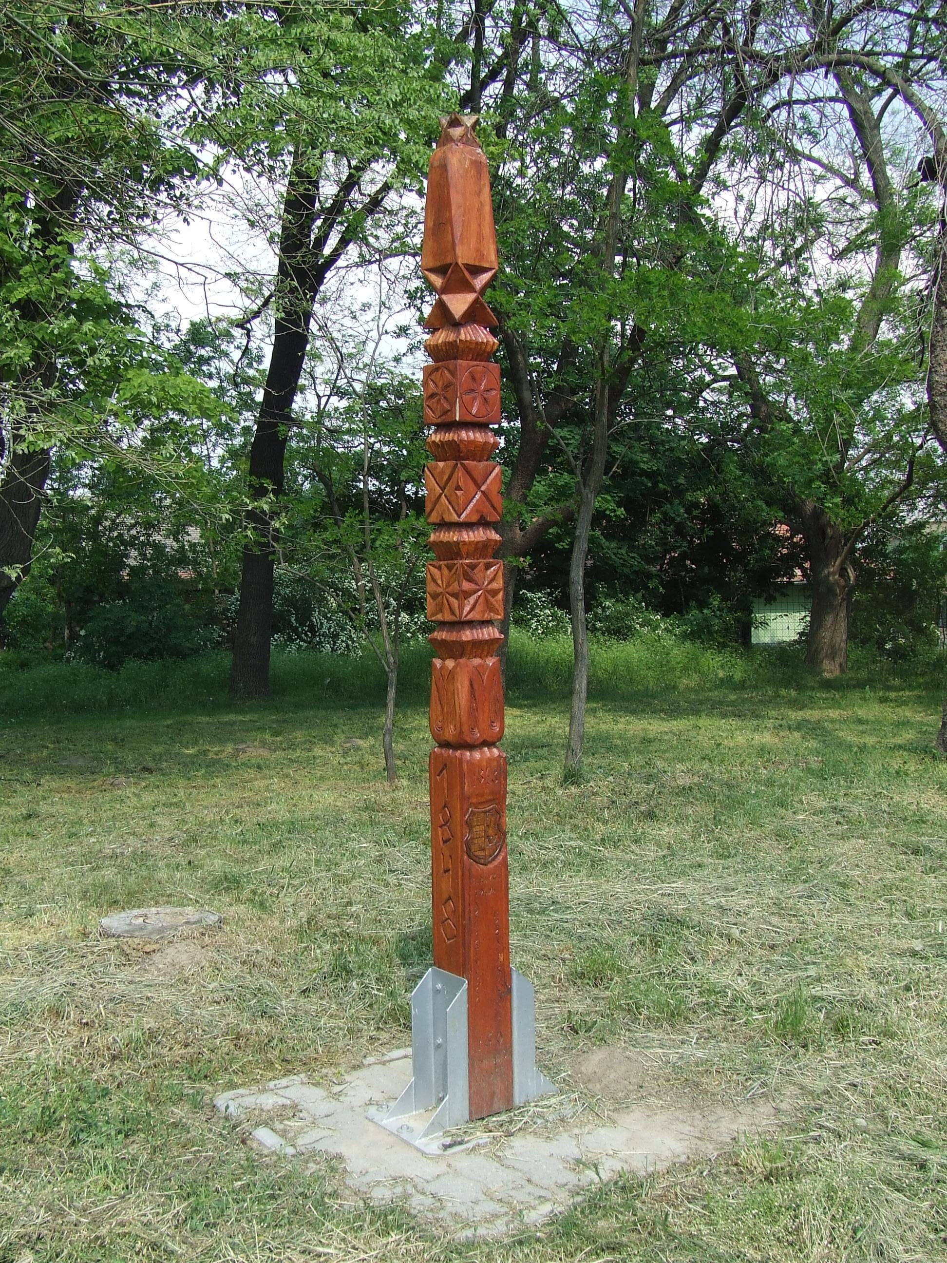 Hősök ligete, Mohács. A tolnai és baranyai nemzetőrség megalakulásának 160. évfordulóján állított kopjafa. A Hősök ligete Mohácson. A Szent Rókus-kápolna Mohács legrégebben (1710) alapított kápolnája. 1931-ben a kápolna melletti temetőkertet emlékhellyé alakították át az első világháborúban itt eltemetett katonák emlékére.